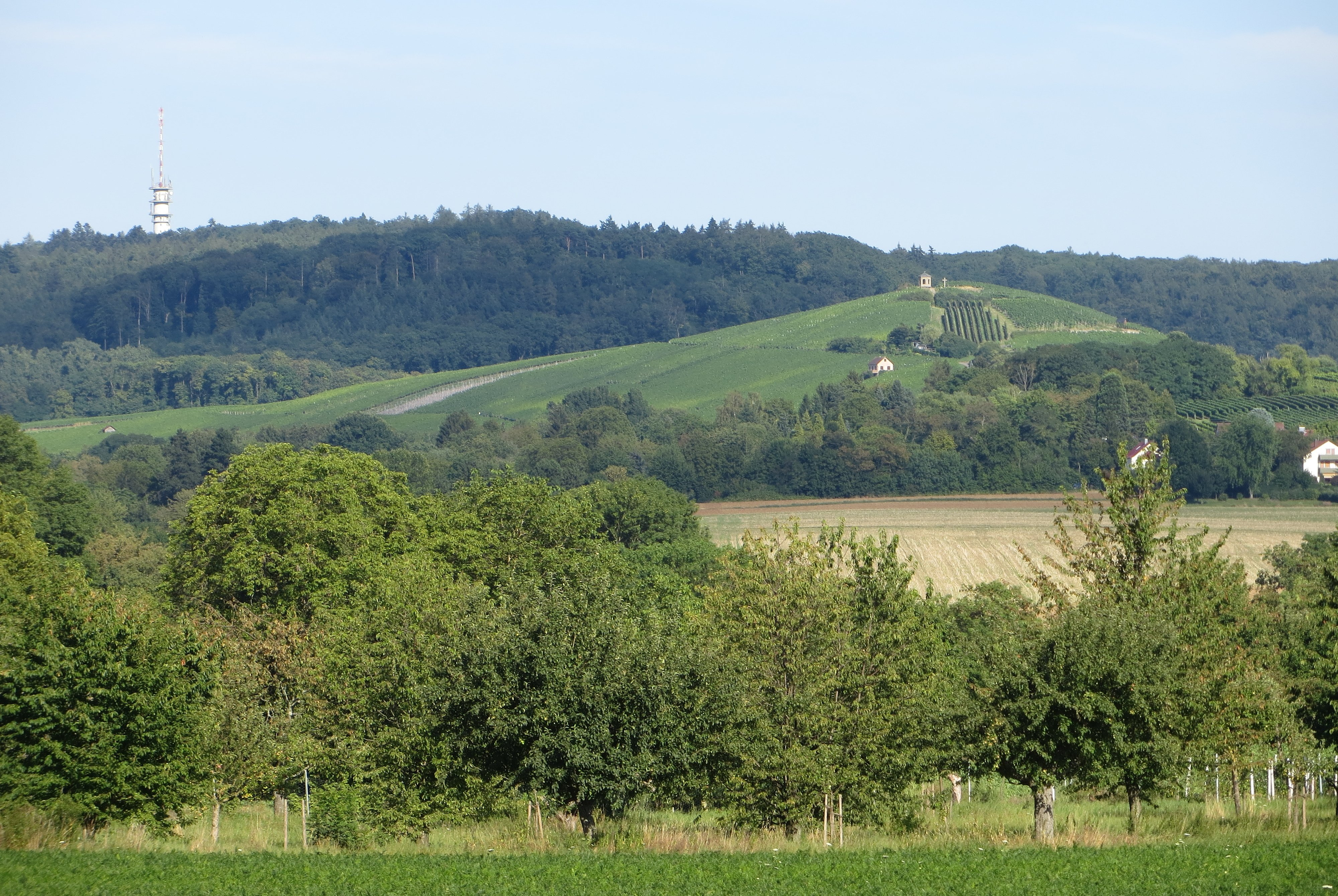 Der Staufenberg in Heilbronn-Sontheim von Sontheim aus fotografiert. Links im Hintergrund der Schweinsberg mit dem Fernmeldeturm.